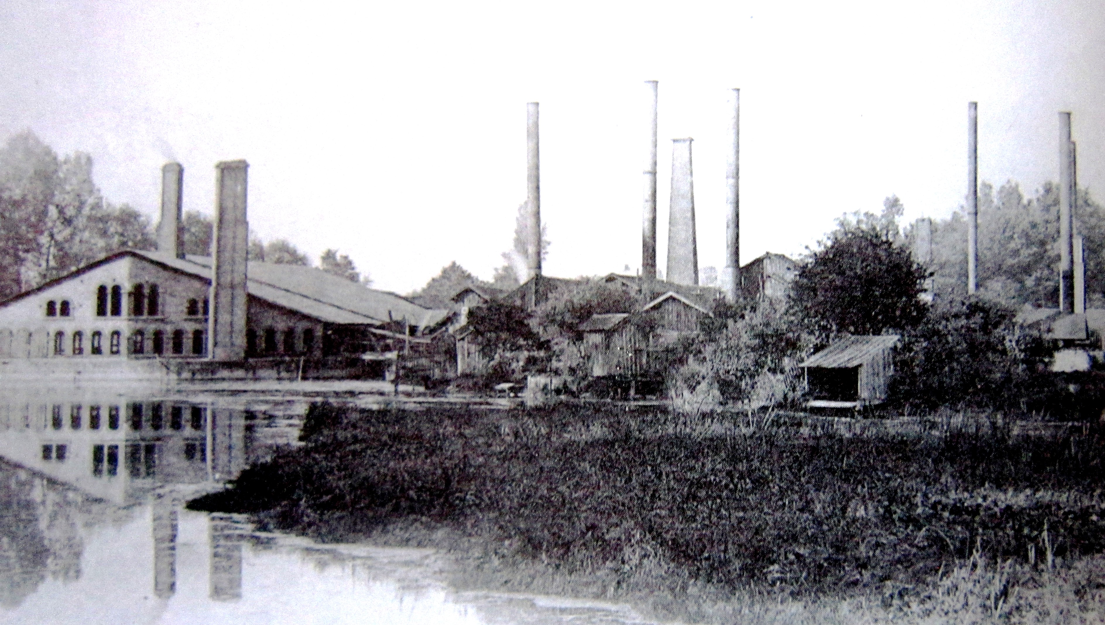 La forge Marmont à Sainte-Colombe-sur-Seine (Côte-d'Or) à la fin du XIX°